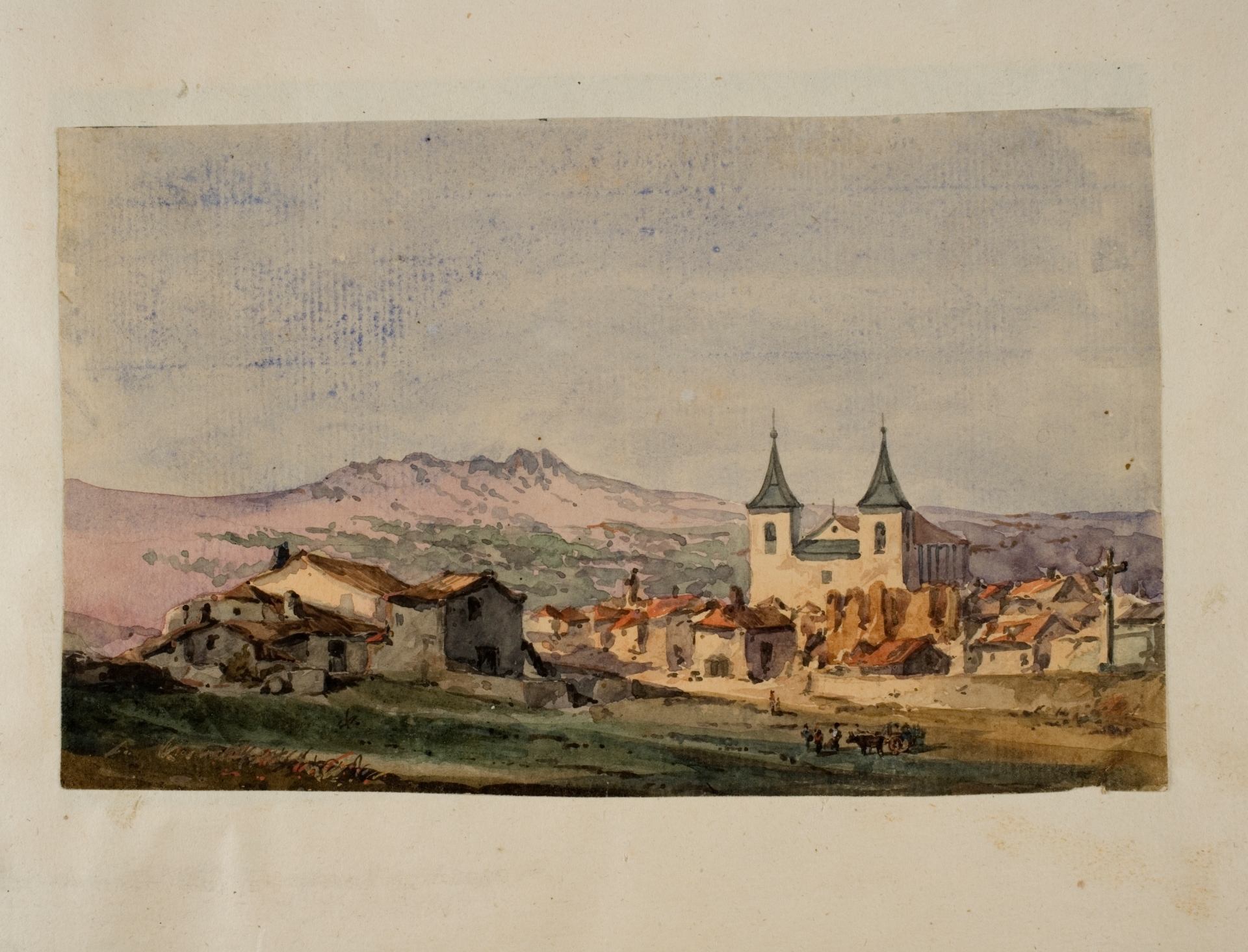 Vista del caserío de El Escorial con la iglesia de San Bernabé (1852-1858), de Martín Rico. Acuarela sobre papel verjurado, 111 x 181 mm. Museo del Prado, Madrid, España